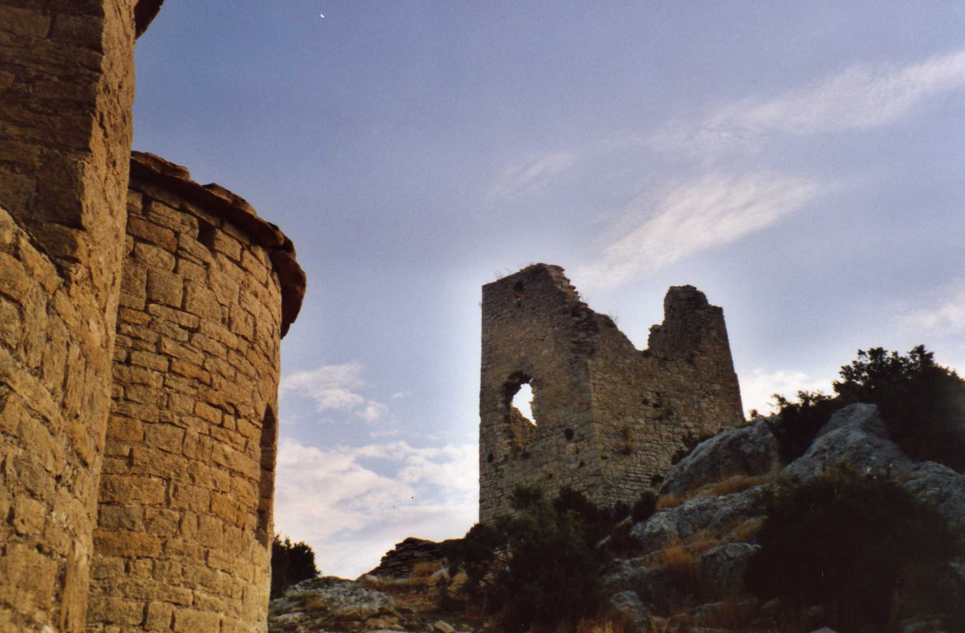 El castillo de Samitier, parte integrante de la línea de defensas del Sobrarbe, mandado construir por el rey Sancho "el Mayor" para defender esta zona de sus dominios frente a las incursiones musulmanas.